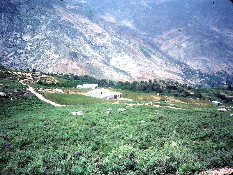 Cultures de haschisch dans le Rif au Maroc